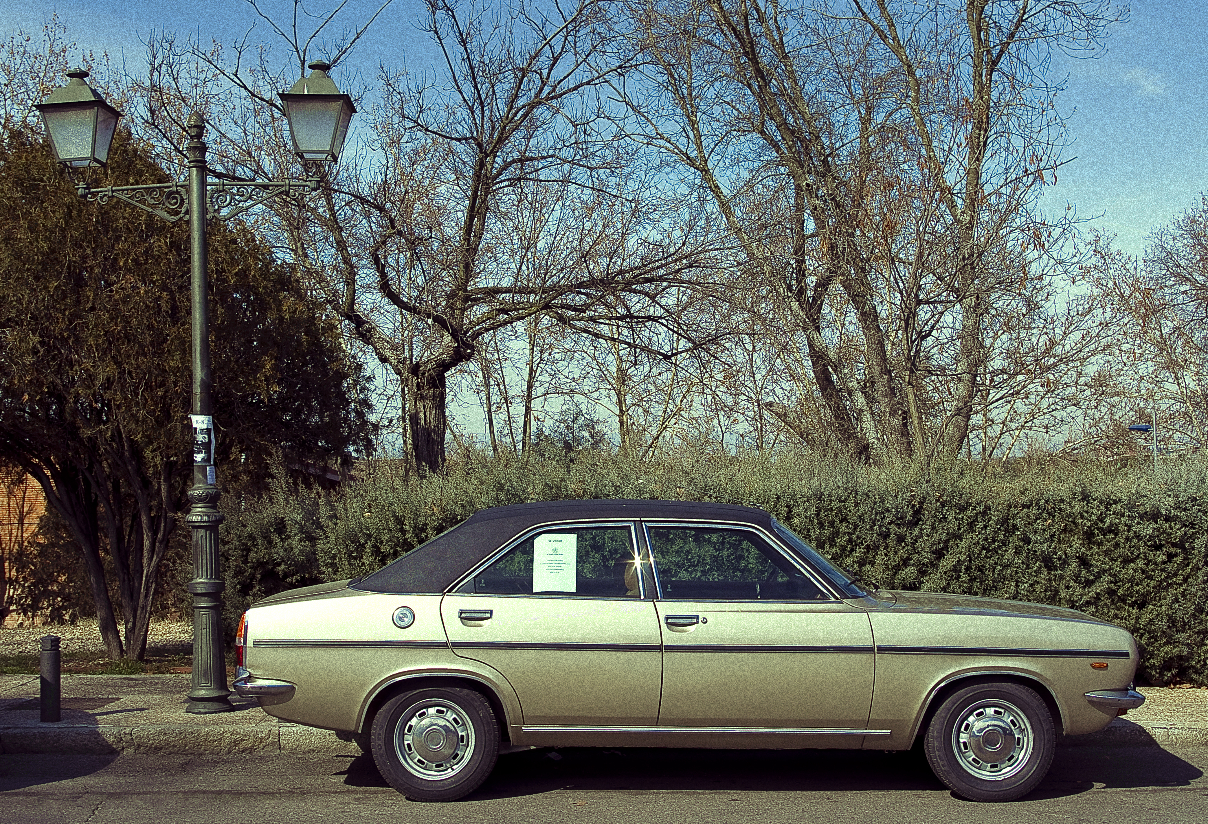 1980 Chrysler 180 [EXPLORED] Mar 3, 2012 #313